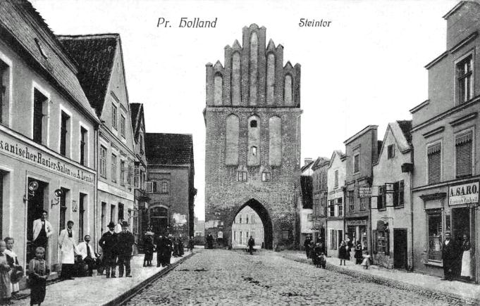 Pasłęk ok. 1900 Preußisch Holland about 1900